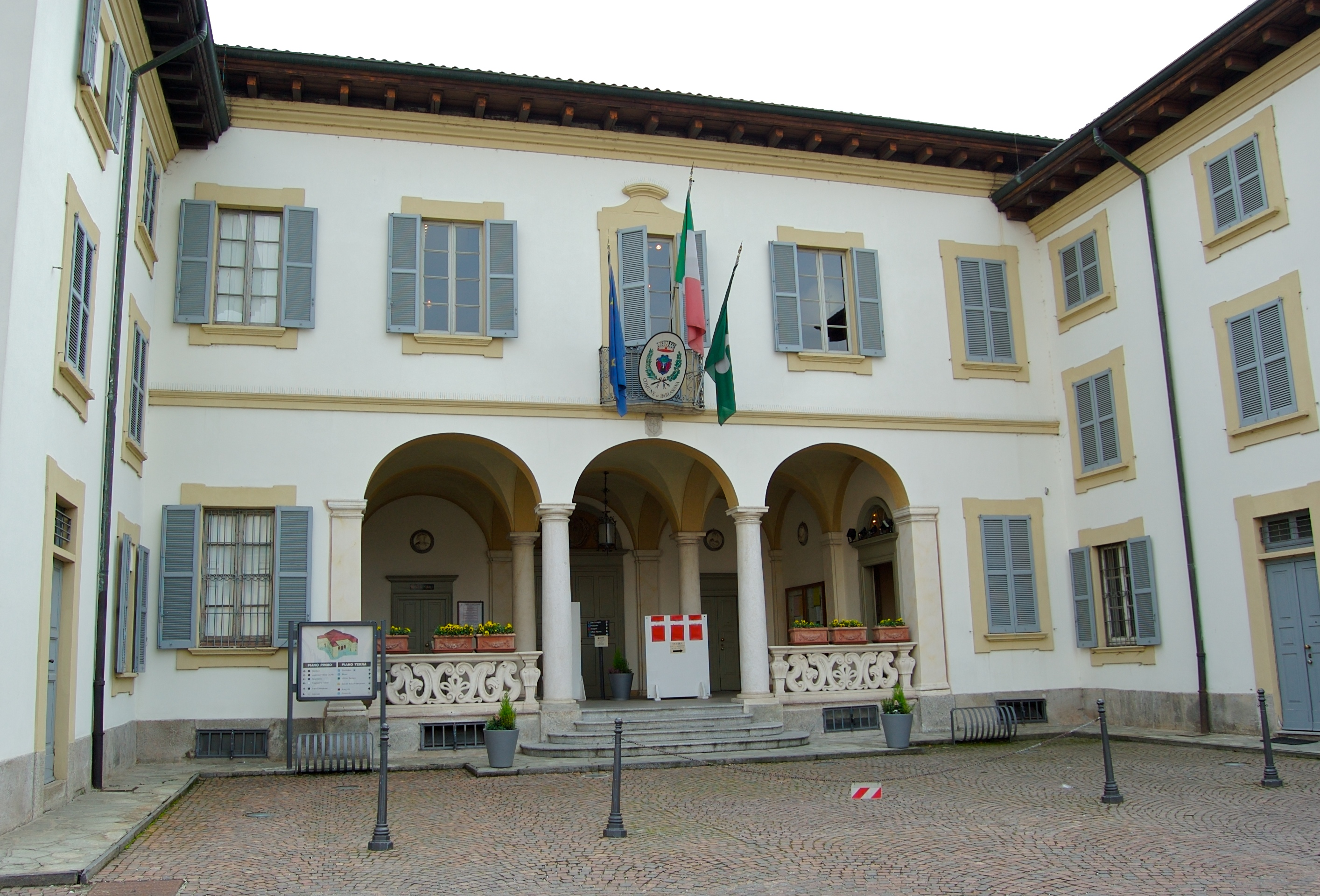 Municipio di Barlassina (MB)